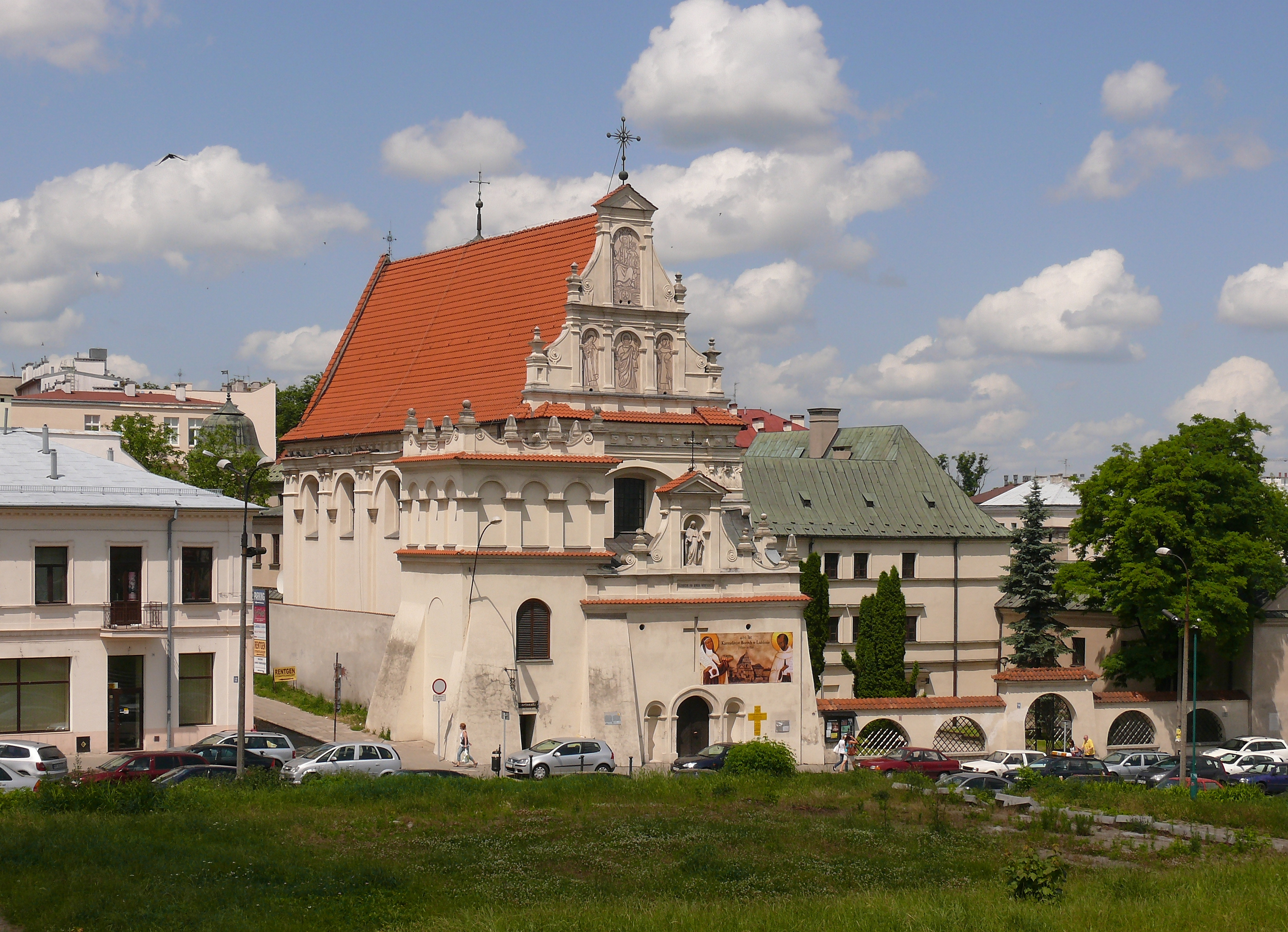 kościół p.w. Św. Józefa Oblubieńca NMP w Lublinie, nr w rej. zabytków 223/56 z 22.10.1957; A/259 z 28.02.1967